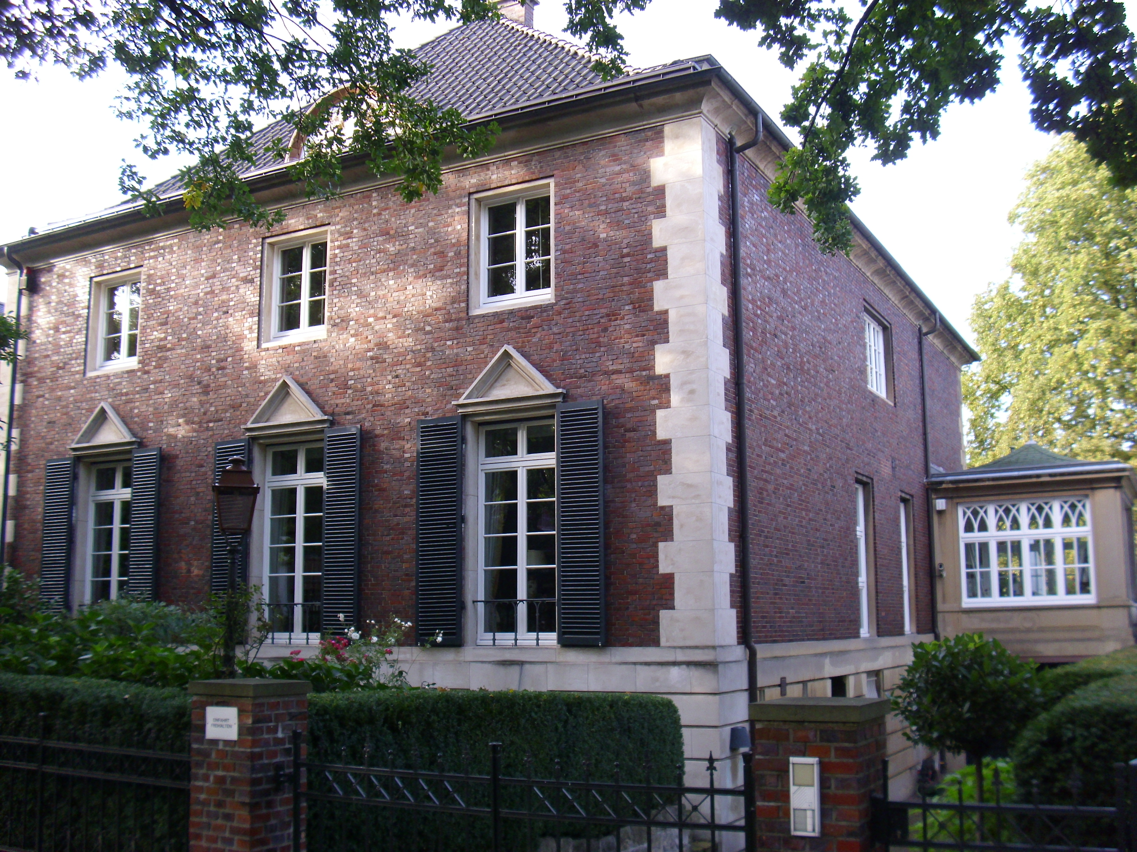 Goernestraße 37